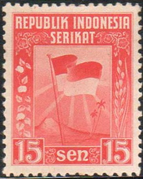 Perangko Indonesia Lama Seri Bendera - 17 Januari 1950